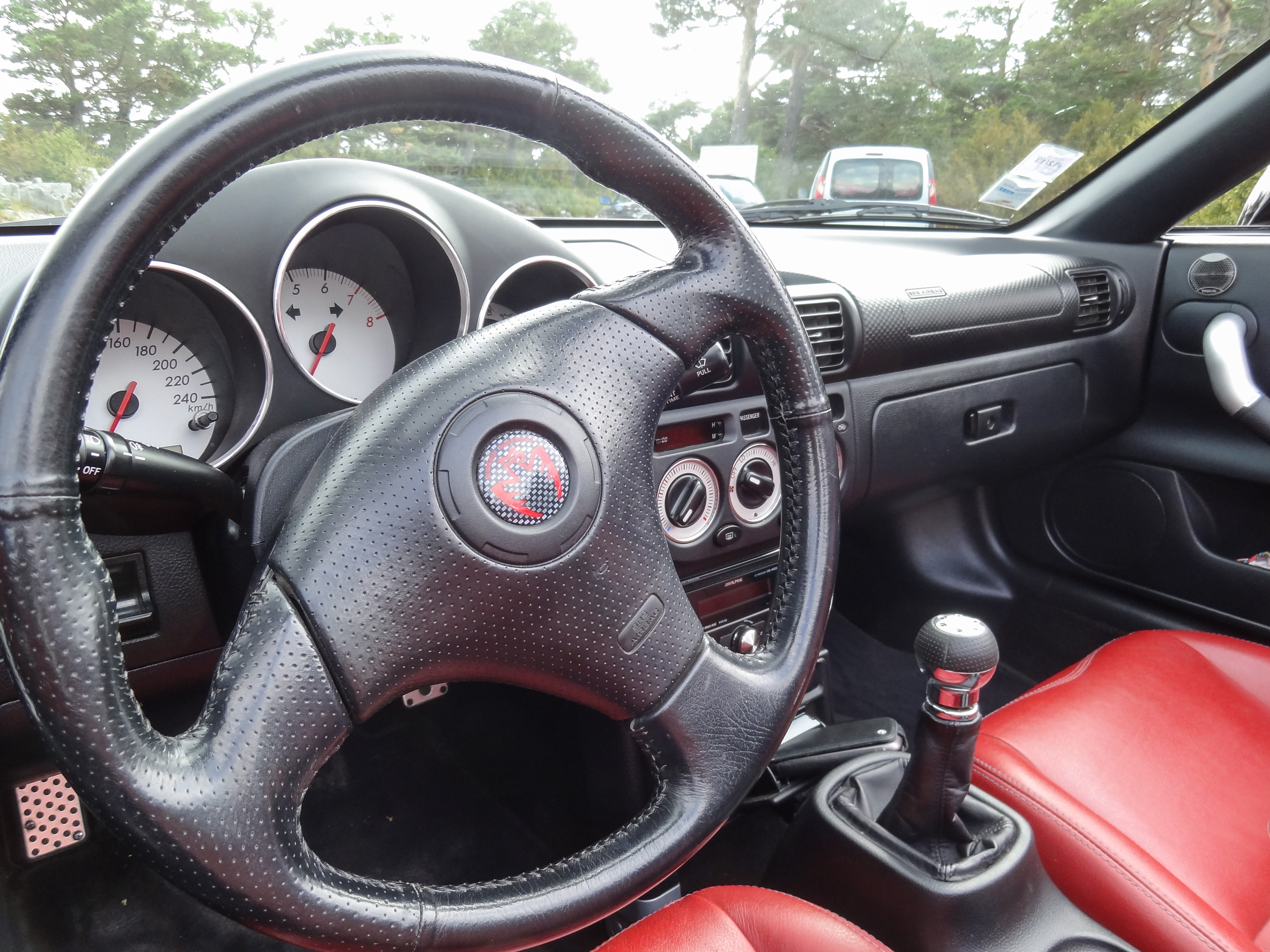 Toyota MR2